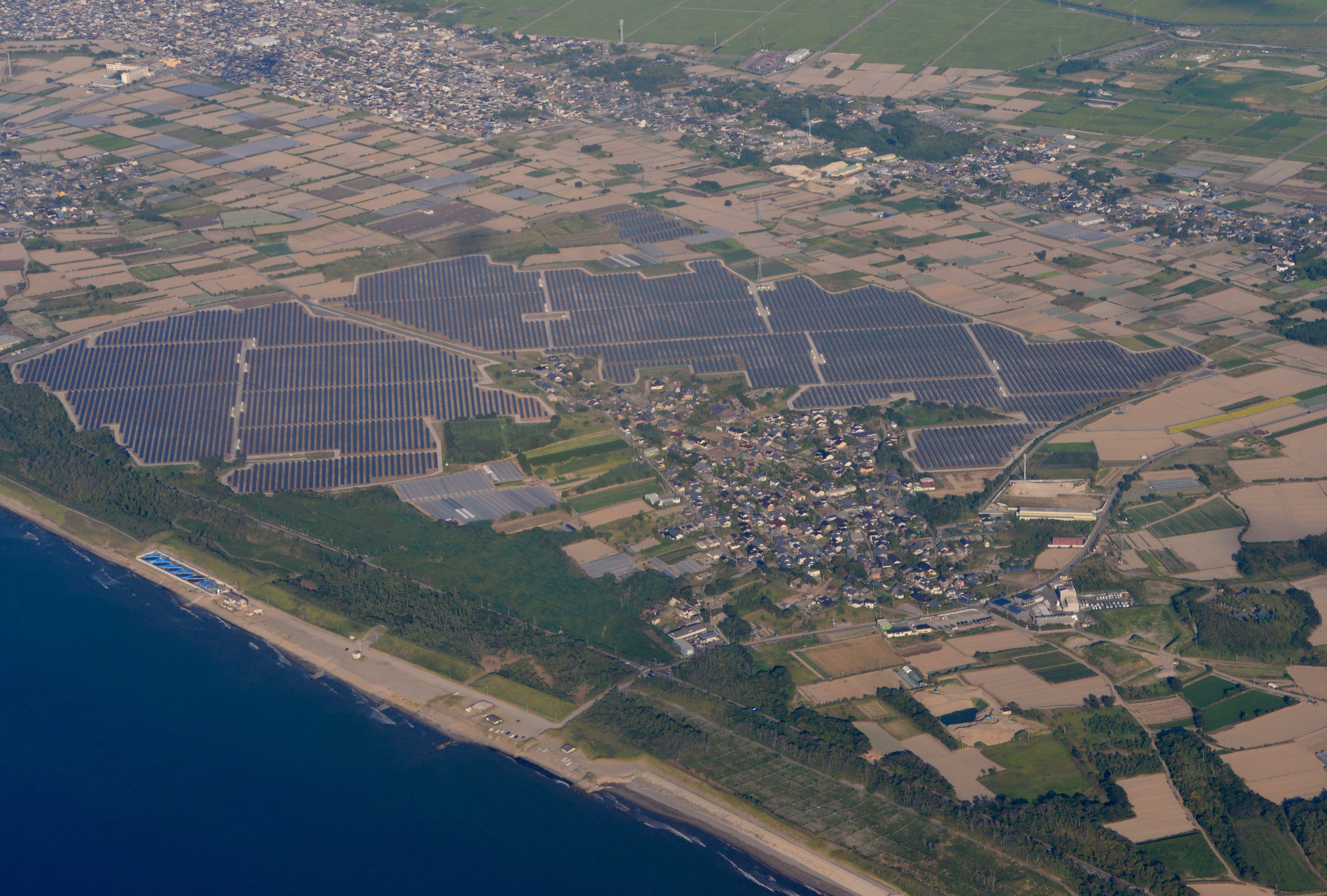 新潟市西区四ツ郷屋地区